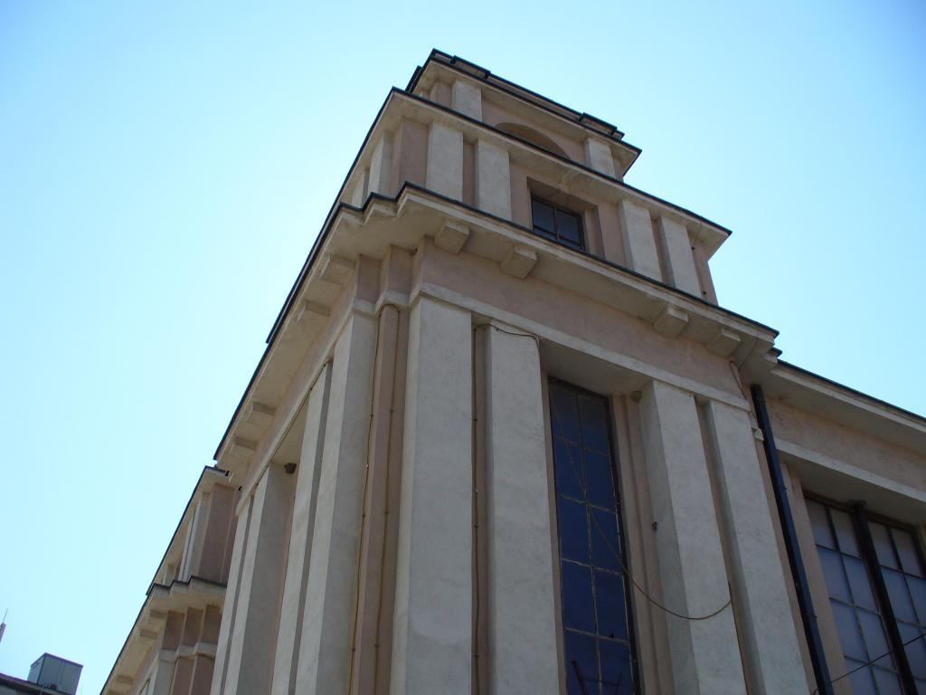 Kumanovo, Macedonia